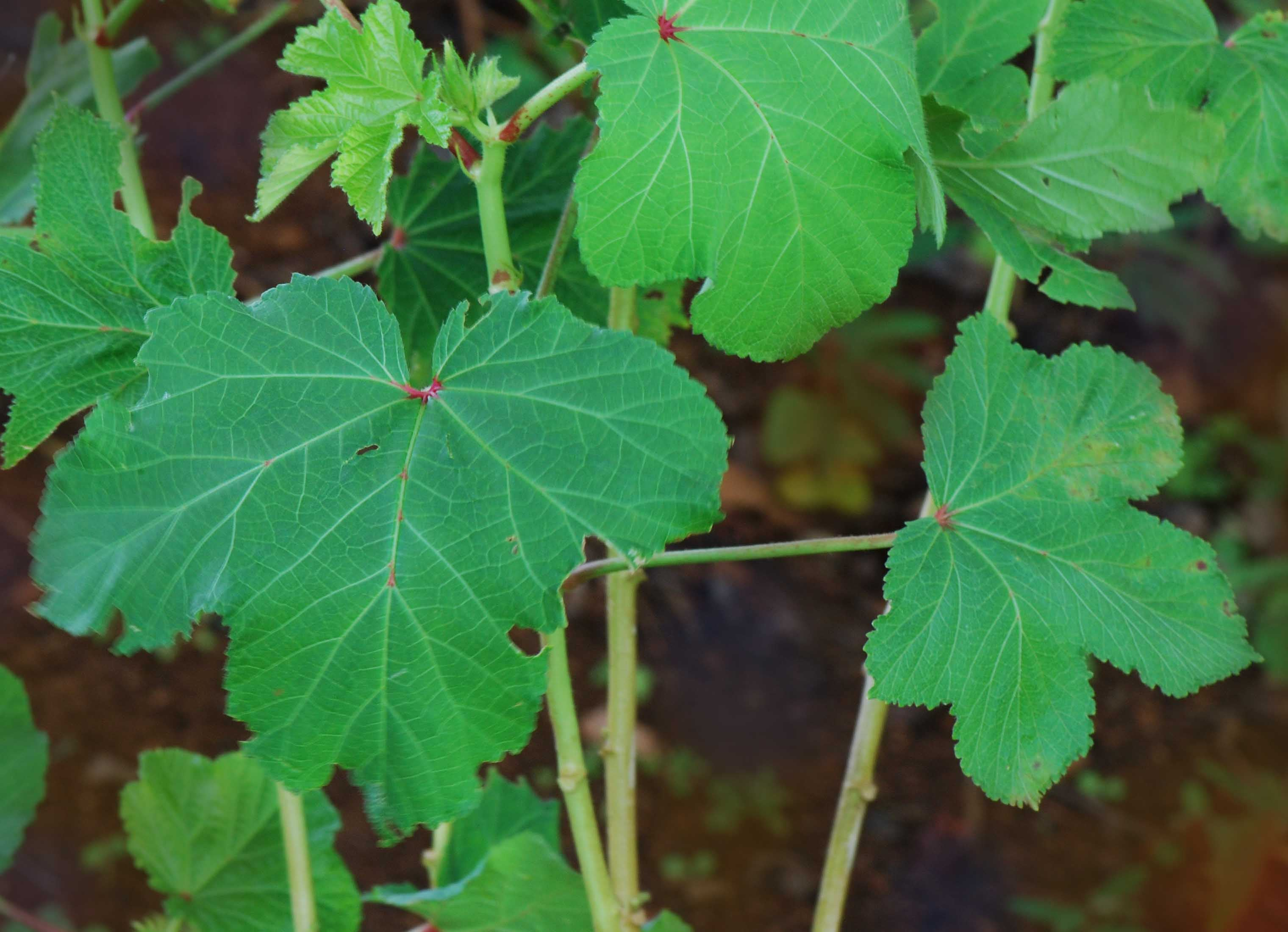 Abelmoschus esculentus, Gombo, feuille